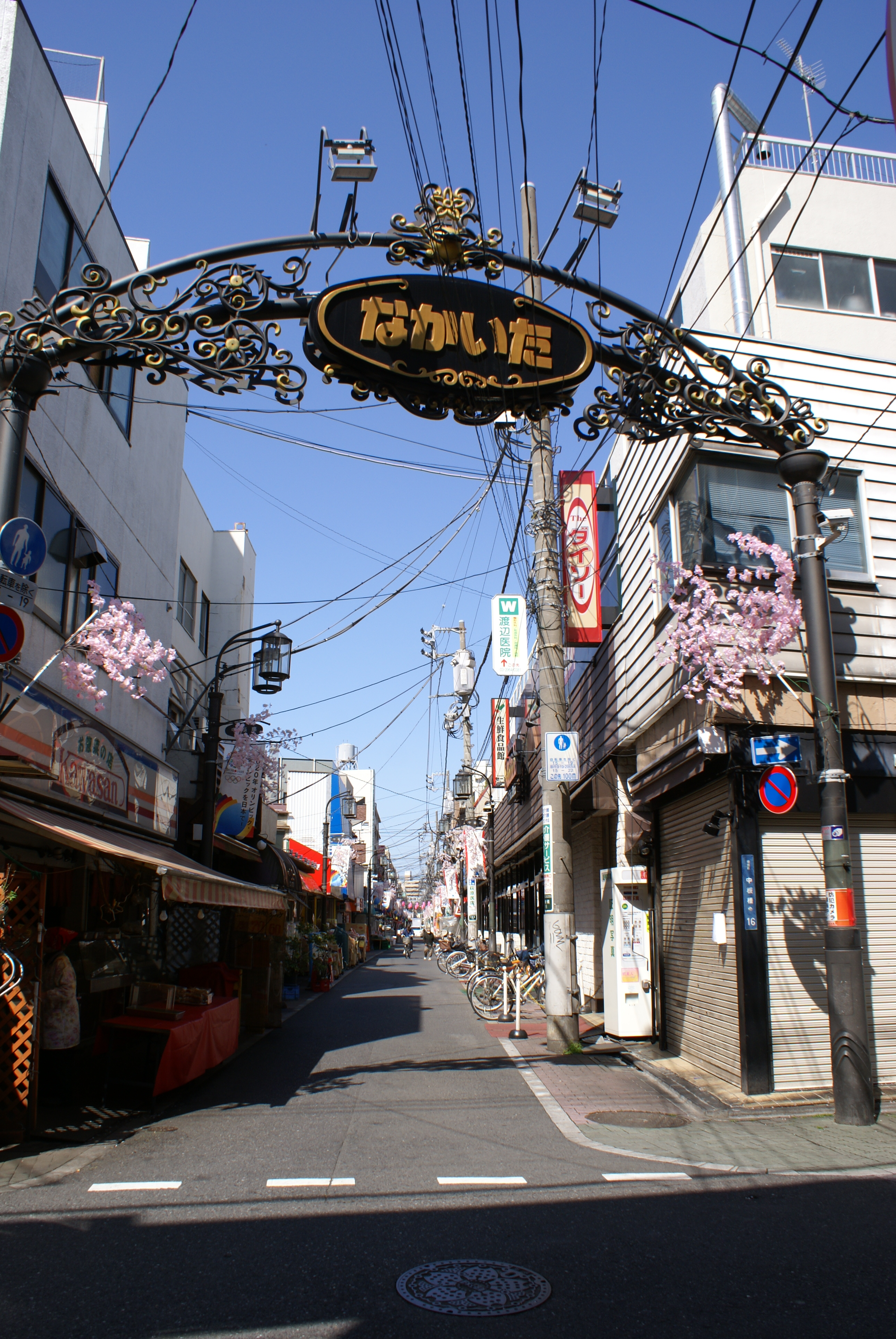 中板橋商店街